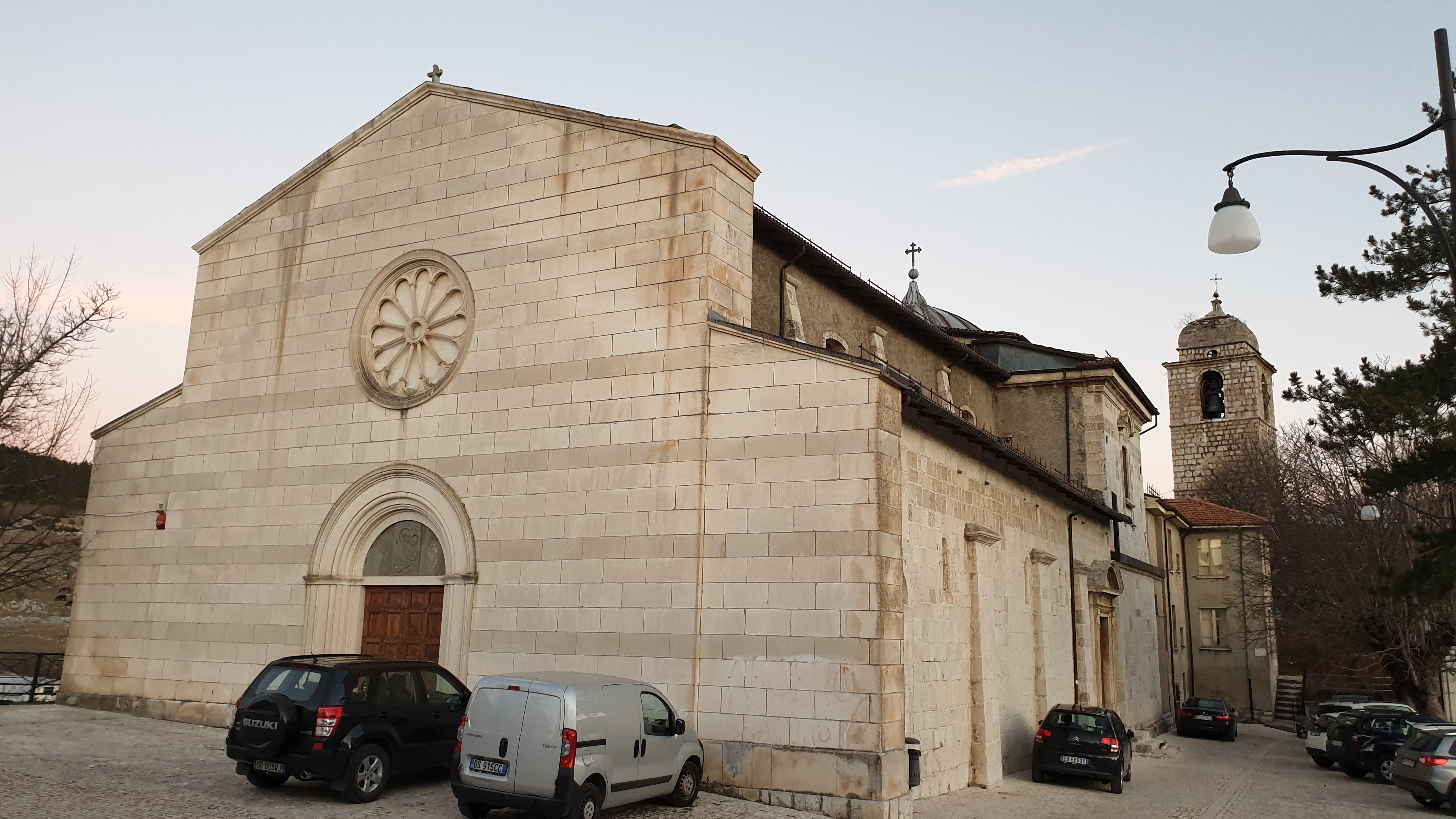 Chiesa di Santa Maria della Neve (Rocca di Mezzo)